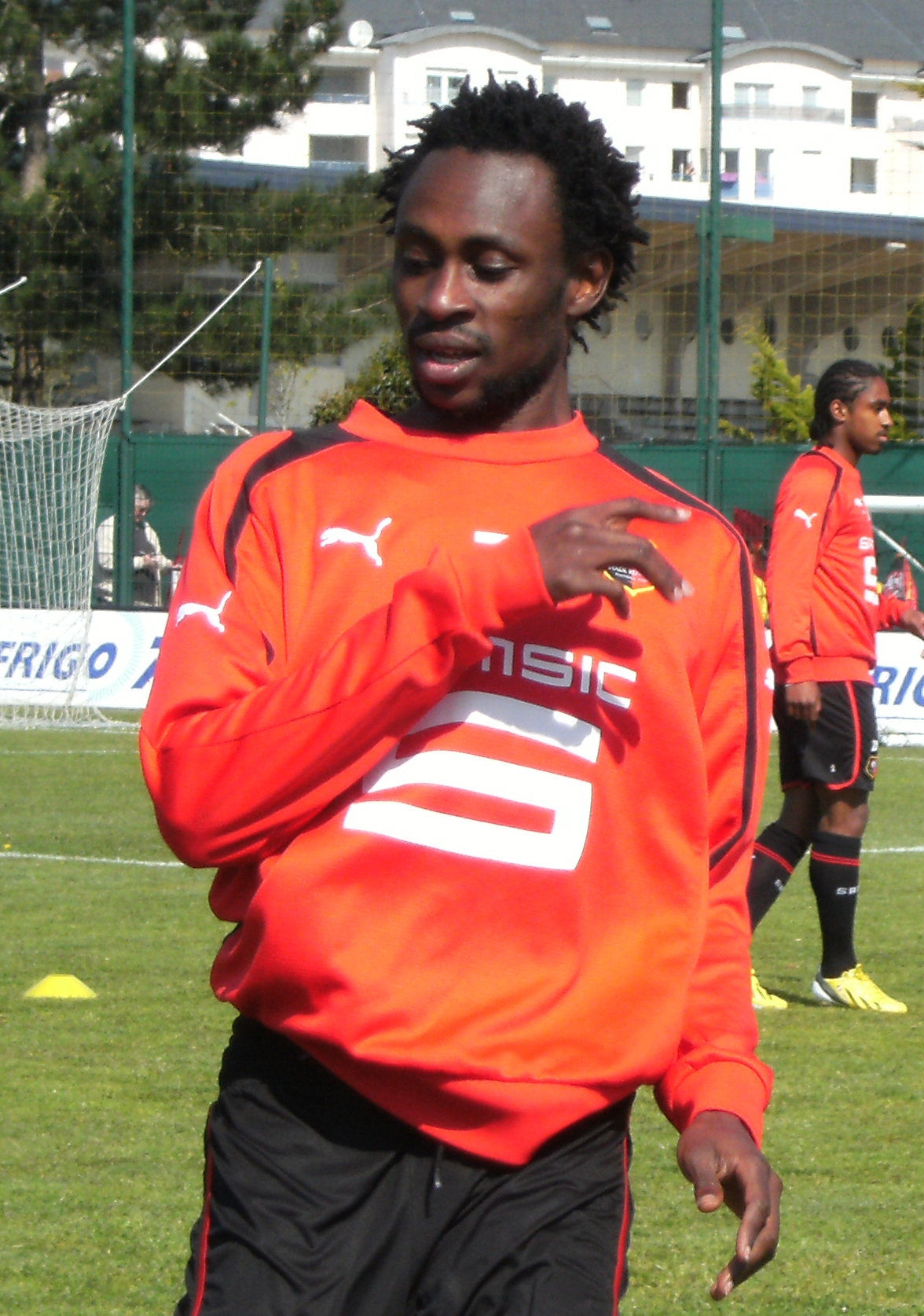 Photo prise lors d'un entraînement du Stade rennais au stade de Marville de Saint-Malo le 3 mai 2013. Ici Jonathan Pitroipa.